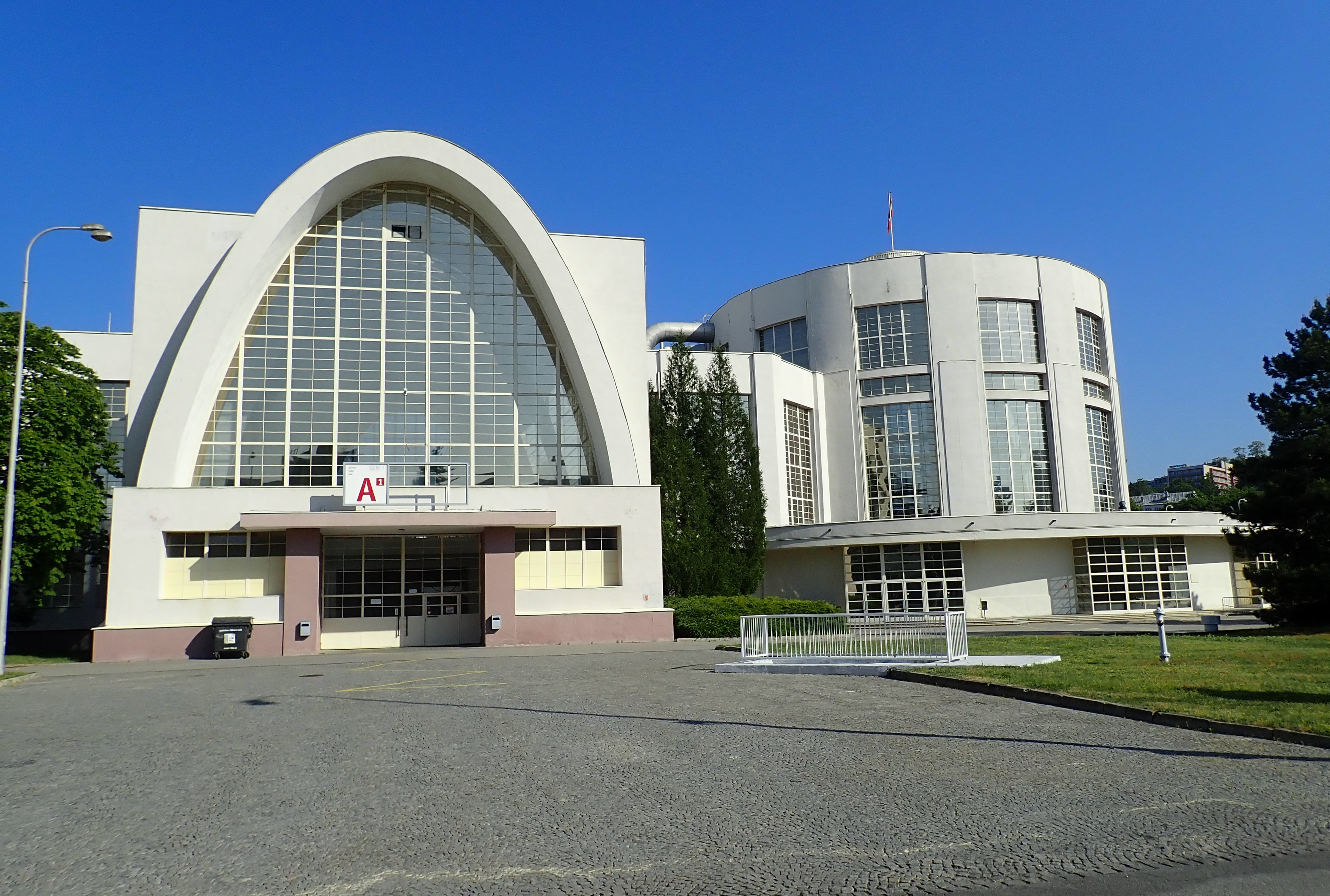 Vstupní portál a rotunda pavilonu A